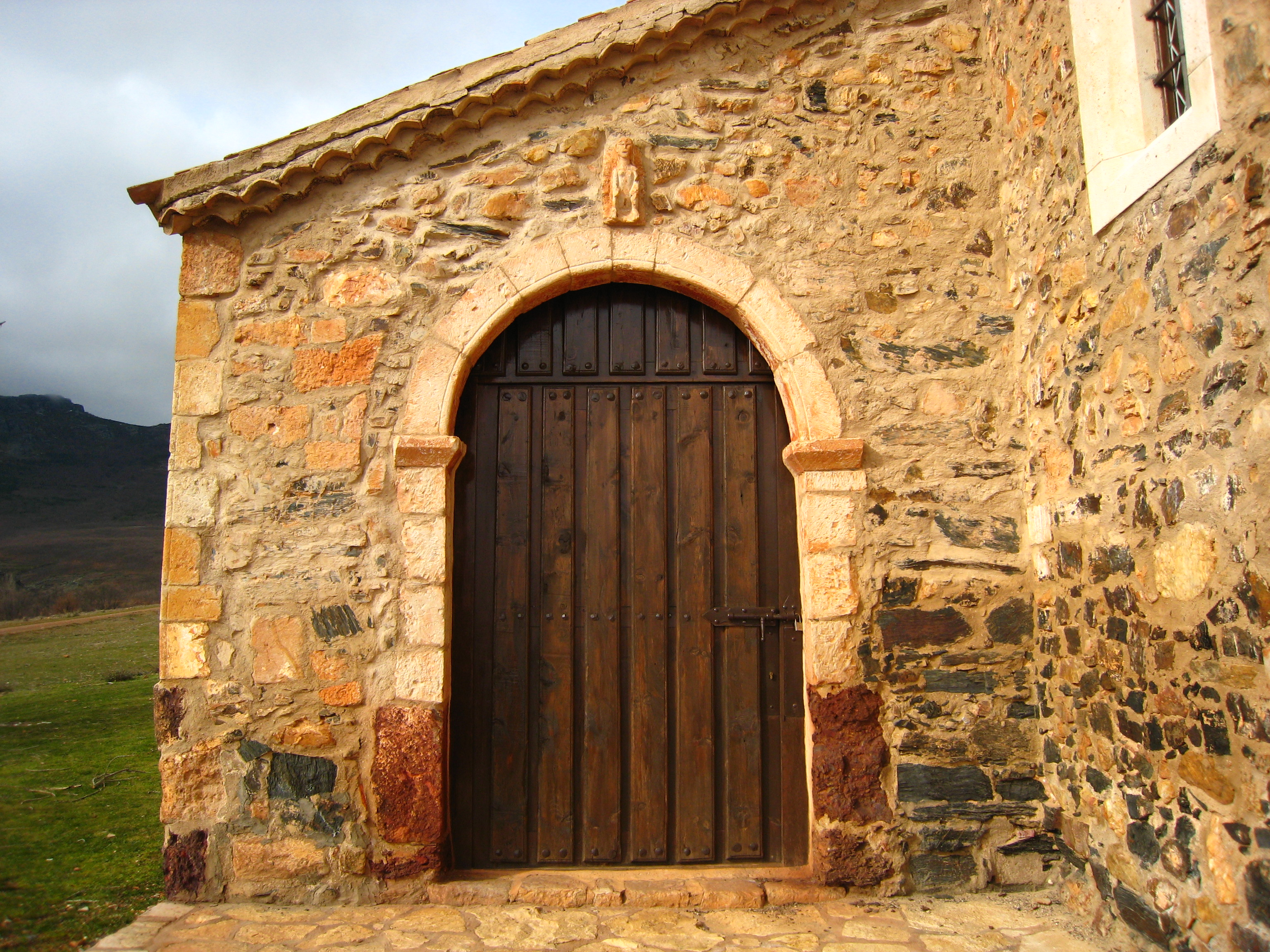 Mártín Muñoz de Ayllón (Segovia), pueblo "rojo" por su arquitectura tradicinal en piedra rodena. - OpenStreetMap (Info)